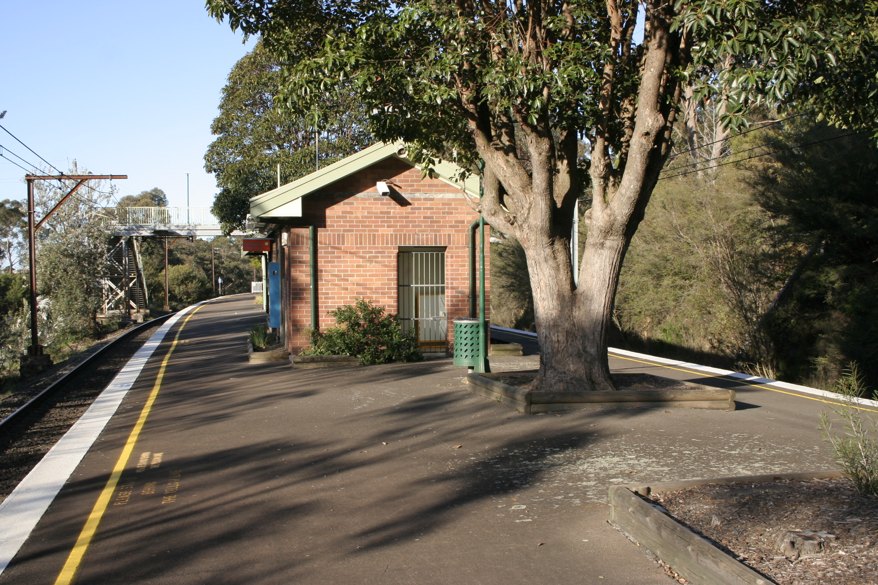 Bullaburra_station